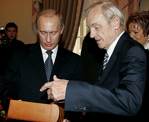 САНКТ-ПЕТЕРБУРГ, КОНСТАНТИНОВСКИЙ ДВОРЕЦ. С народным артистом СССР Кириллом Лавровым.